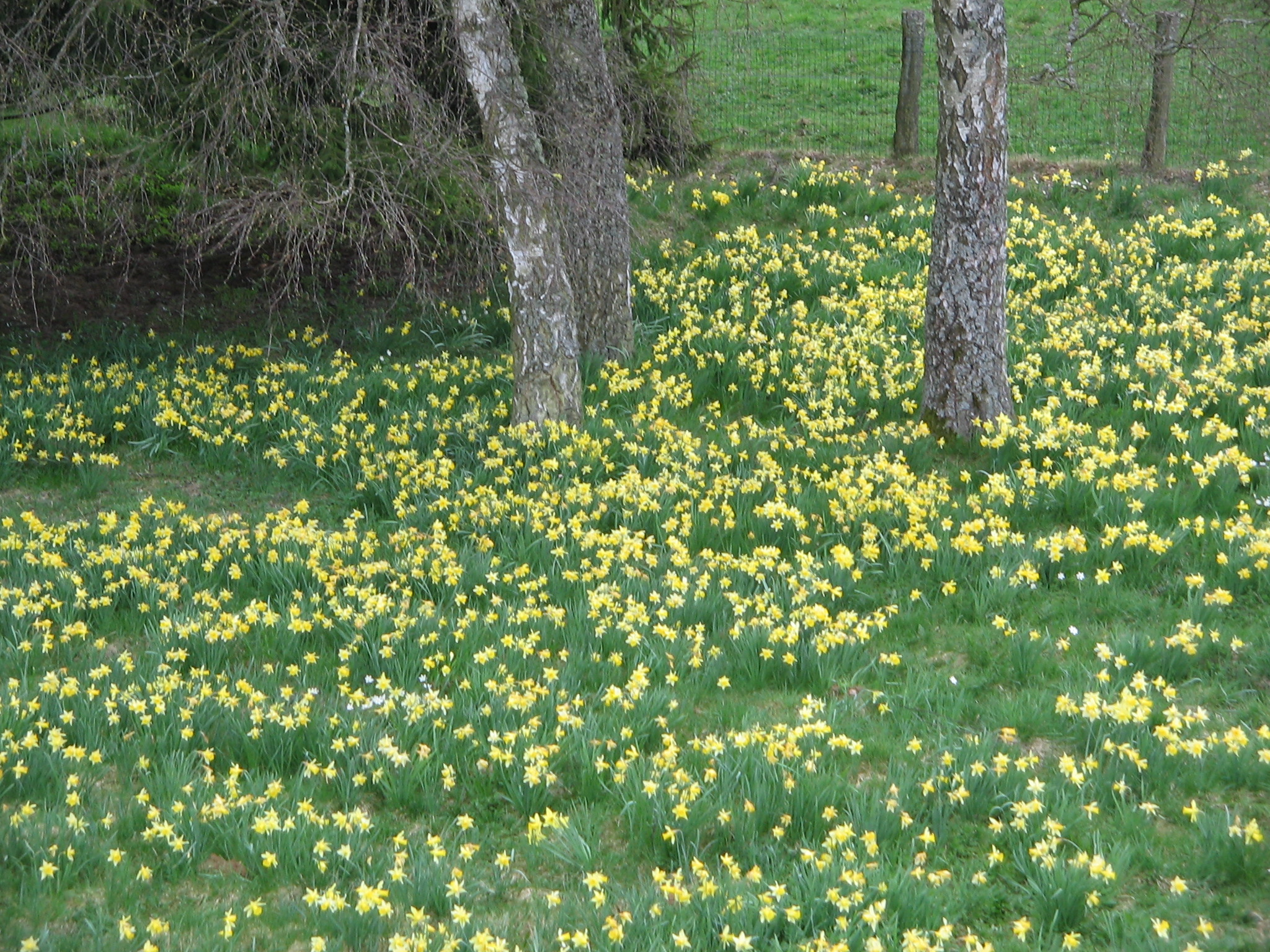 Narcissus pseudonarcissus dans une prairie ardennaise